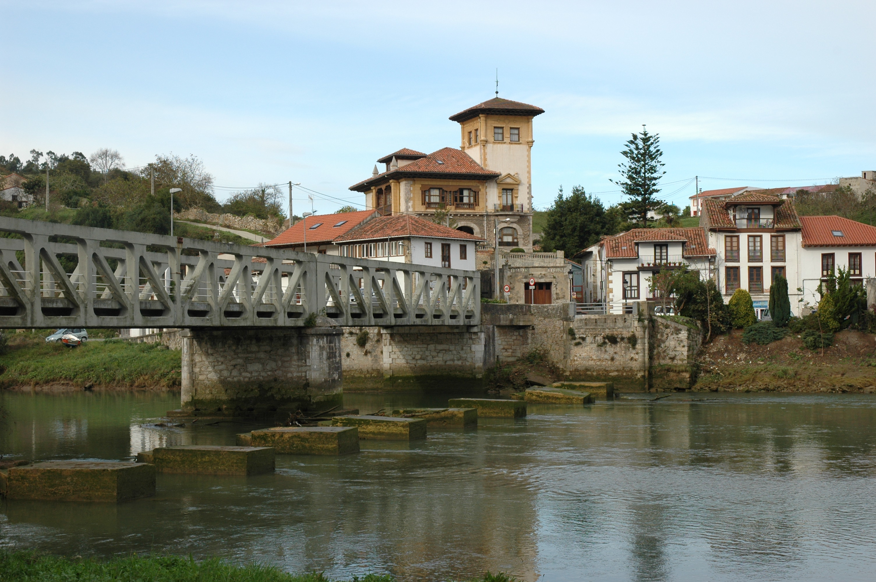 Vista parcial de Bustiu y del ponte vieyu dende Unquera.